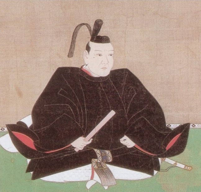 生駒高俊の肖像。